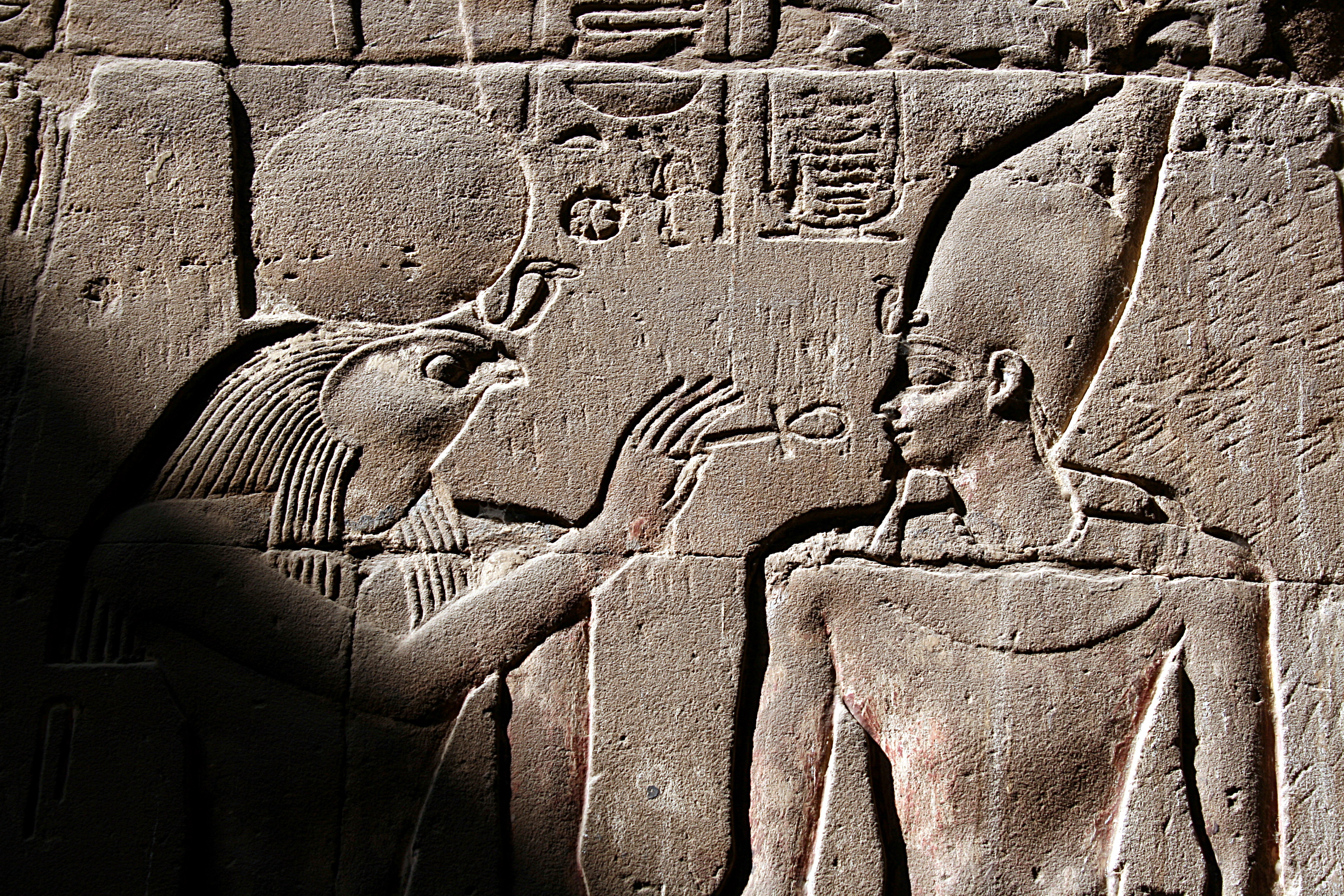 Luxor Tempel